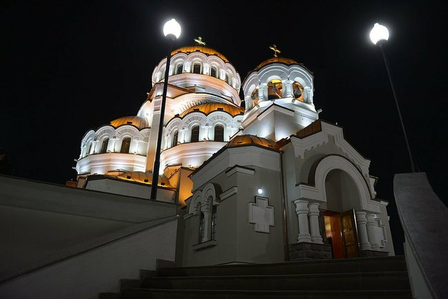 Присутствие В. В. Путина на праздничном рождественском богослужении в храме Нерукотворного Образа Христа Спасителя, построенном рядом с Олимпийским парком в Имеретинской низменности в Сочи.